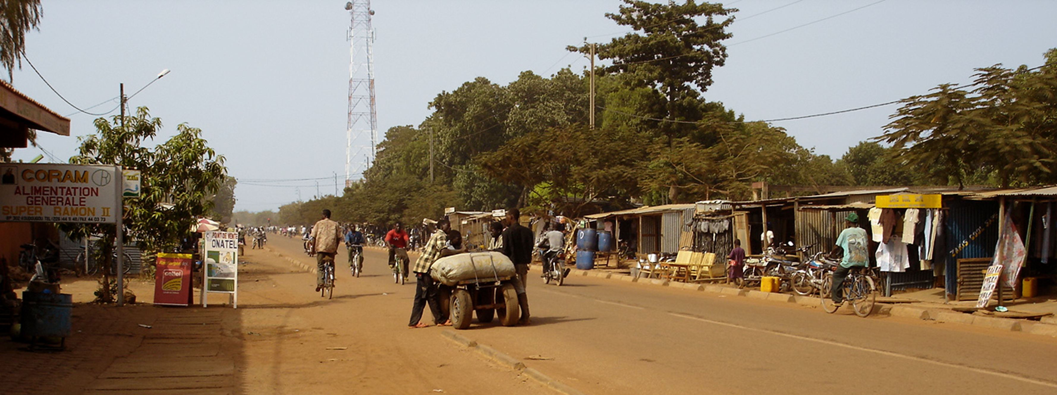 rue principale de Koudougou en centre ville